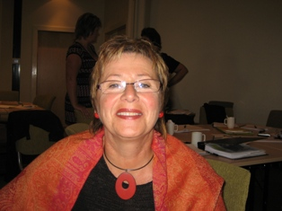 Helga Hjetland, leder av Utdanningsforbundet